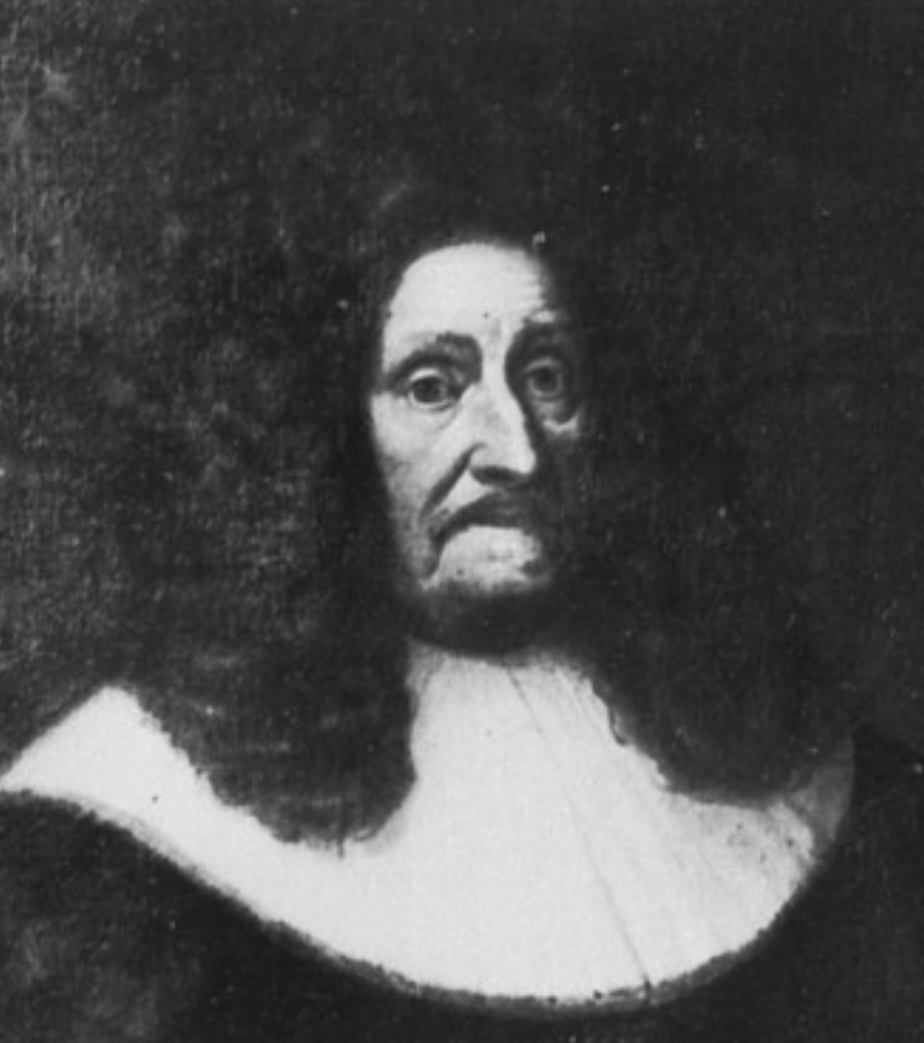 Gotthard Marquard († 1. April 1694), Lübecker Ratsherr